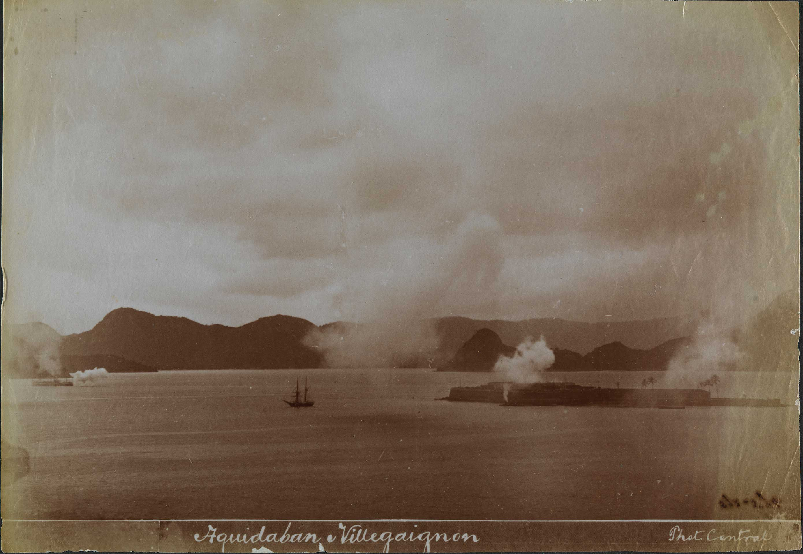 Aquidaban e Villegaignon [Iconográfico]